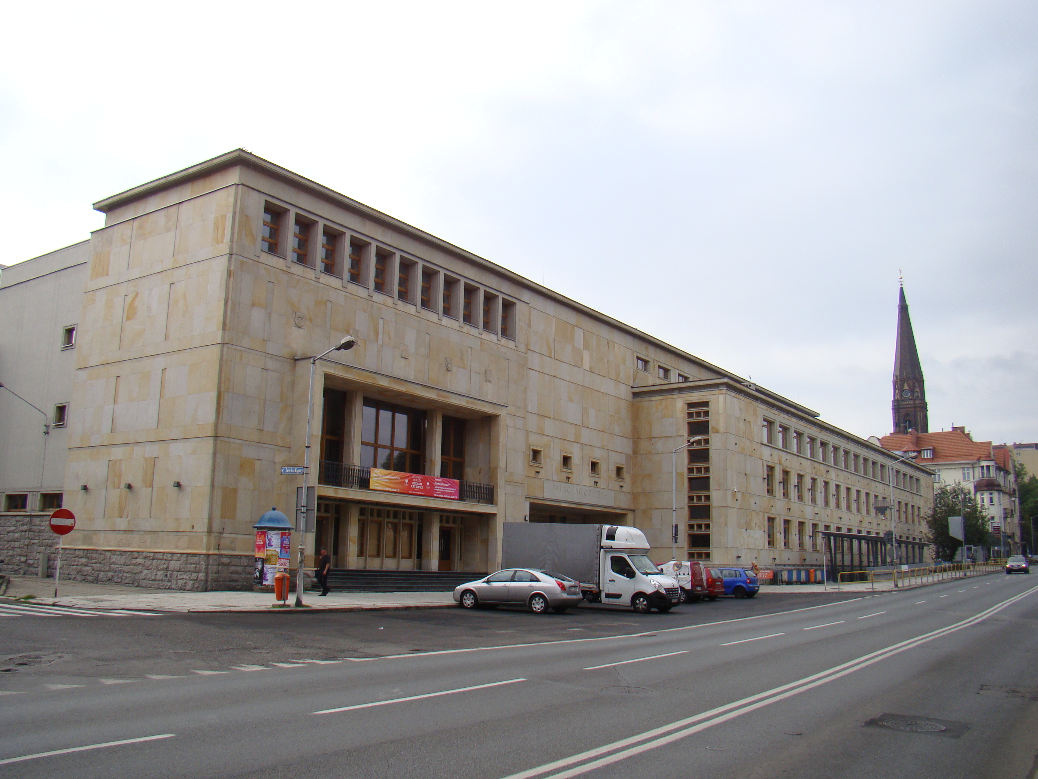 Katowice, zespół pałacu młodzieży, 1948-1951, 1962, 1966-1968